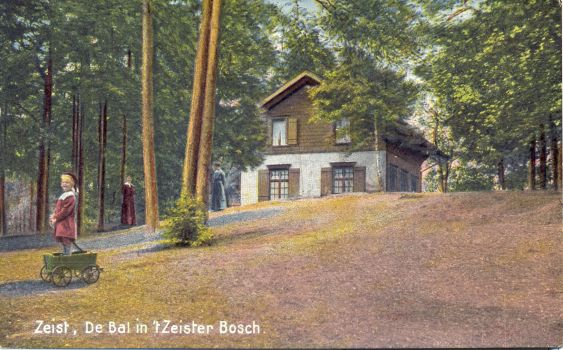 De Boswachterswoning in het Zeisterbos op de Prins Bernhardlaan 1 in Zeist. Vernoemd naar de 'DE BAL' (PRENTBRIEFKAART INGEKLEURD CIRCA 1915, J.W. KRAAL)